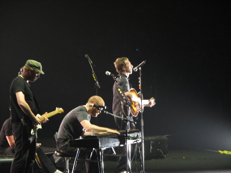 Coldplay in Hong Kong, 2006.